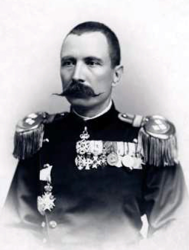 Петар Бојовић (1858-1945) као генералштабни пуковник, 1912. година Извор: Миле С. Бјелајац (2004). Генерали и адмирали Краљевине Југославије 1918-1941, Институт за новију историју Србије, Београд. стр. 129. ISBN 86-7005-039-0.